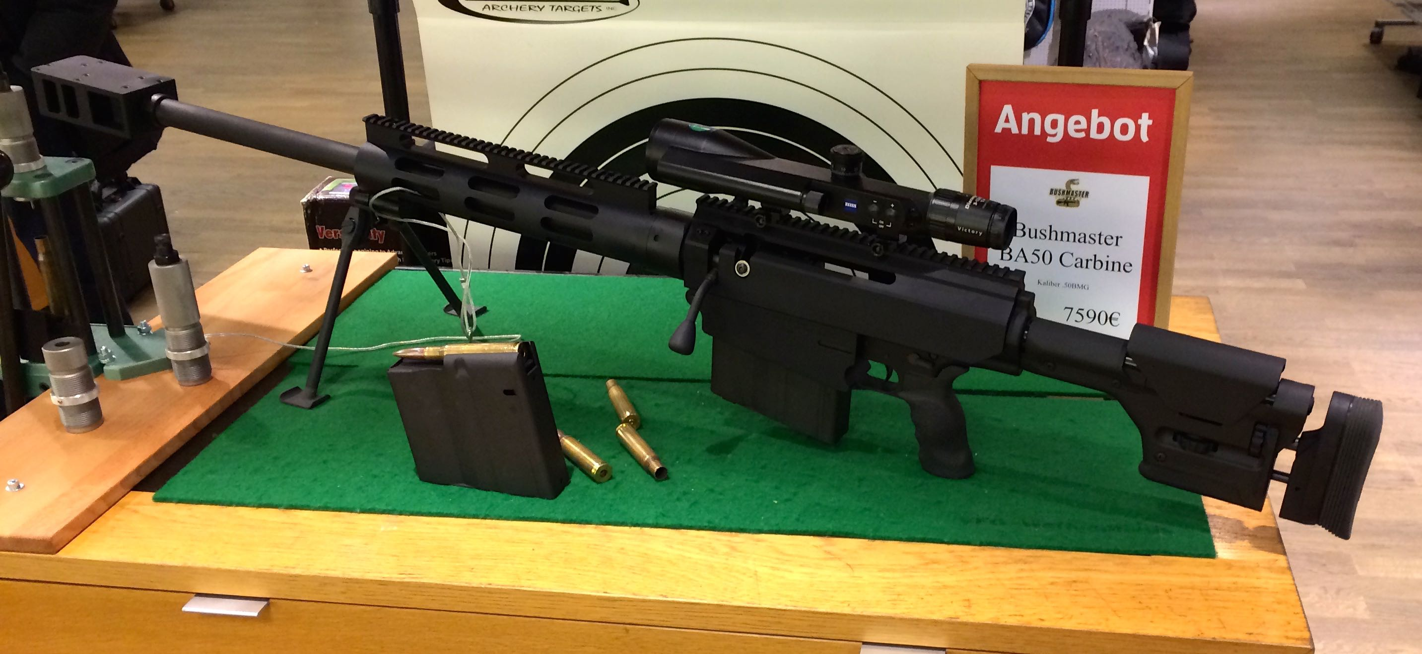 Bushmaste 50 AE Carbine